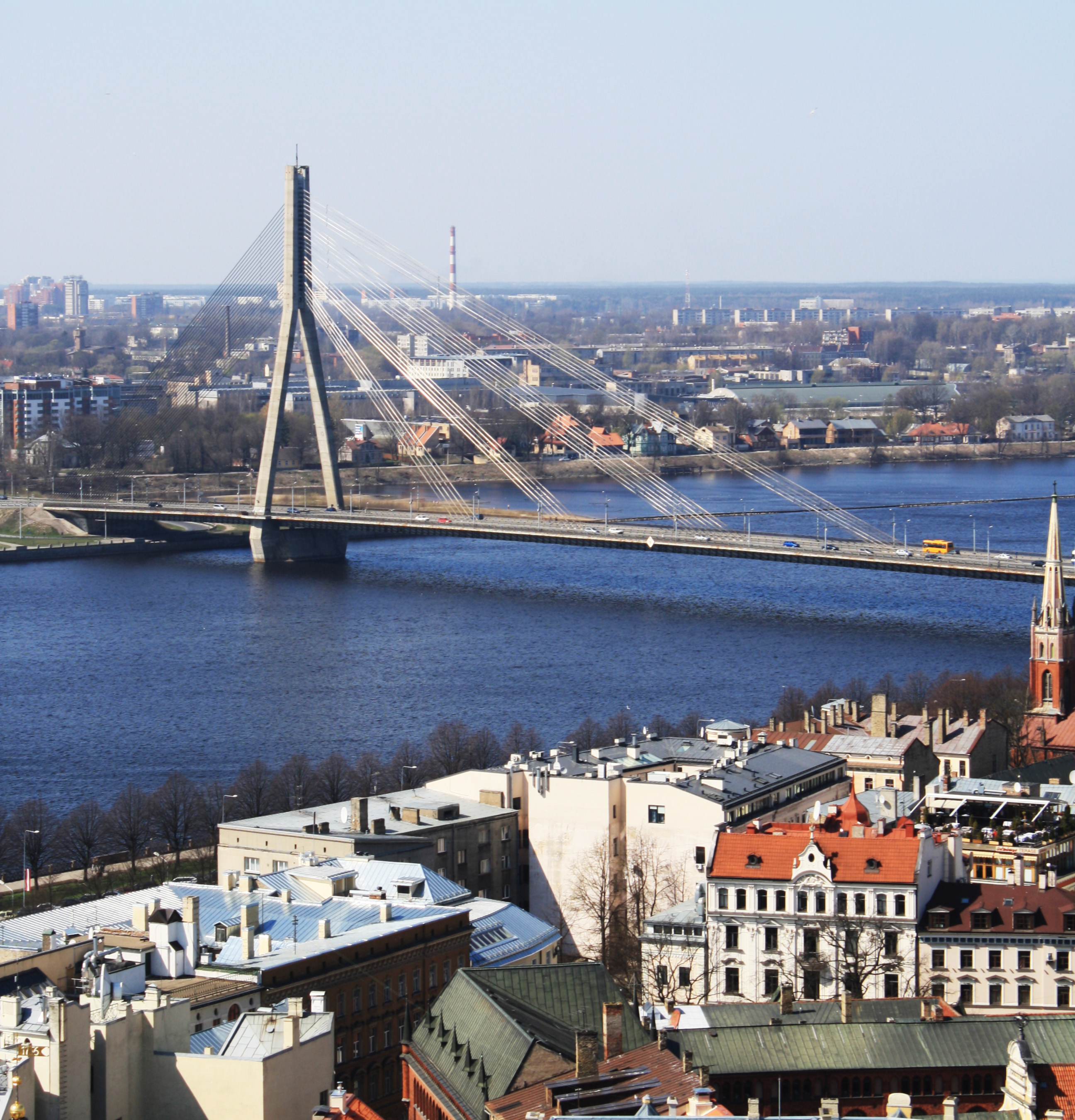 Рига (Латвия) Вантовый мост